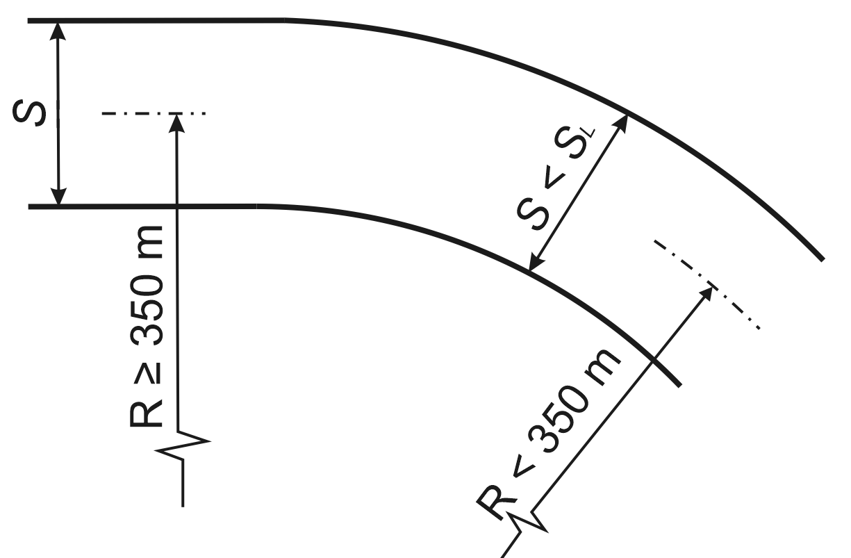 Ceļa plāna sliežu platumshēma platajam sliežu ceļam